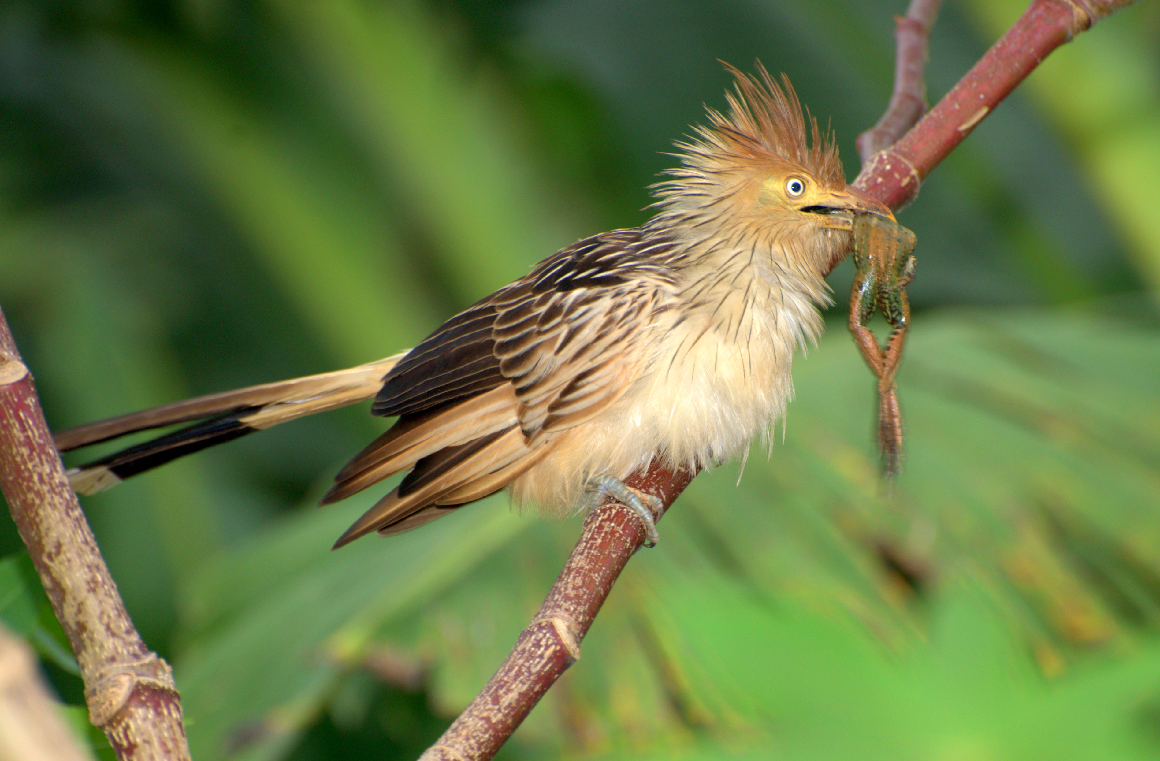 Vale do Ribeira - Registro-SP - Brasil